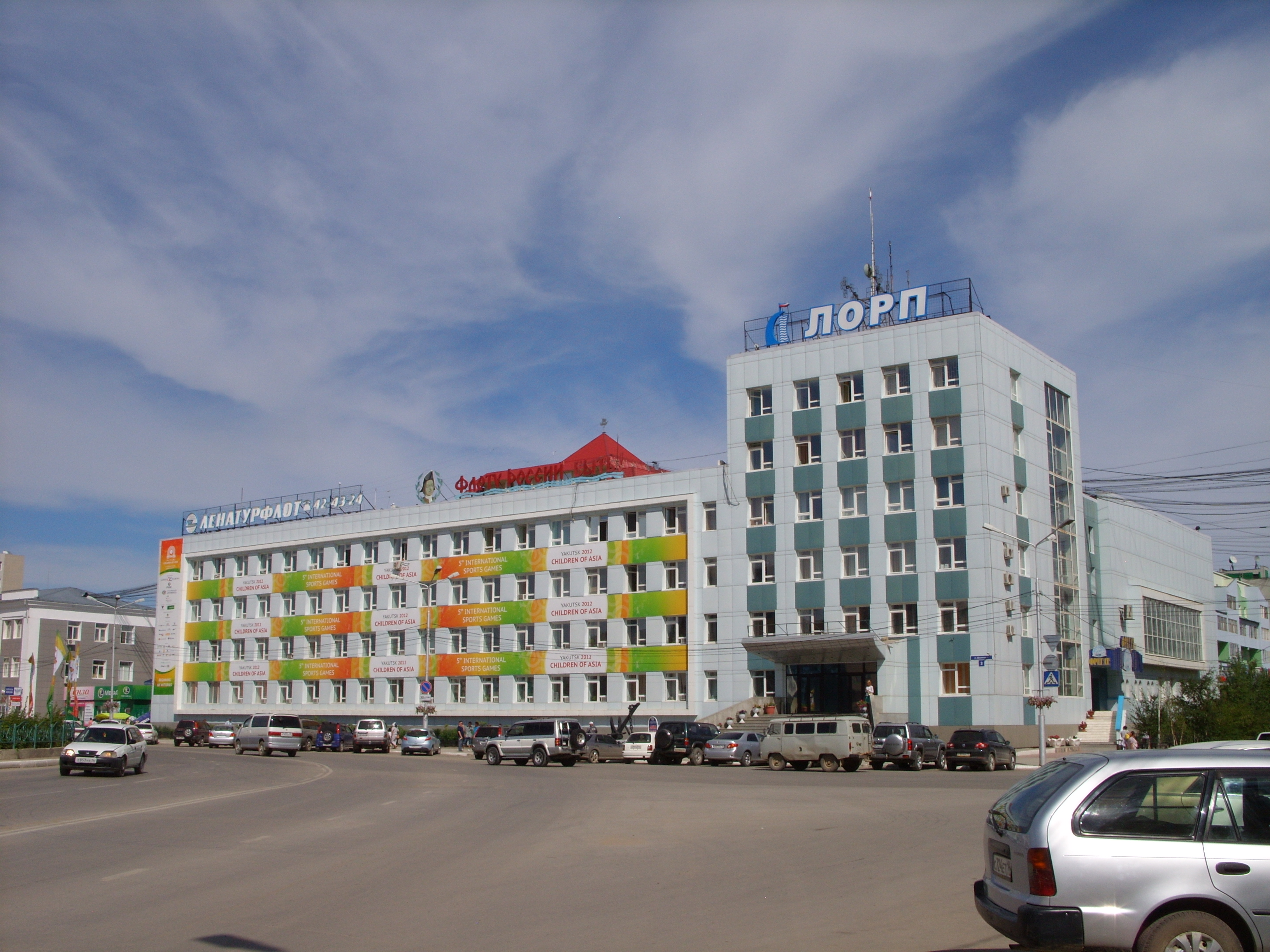 Офис компании "Ленское объединённое речное пароходство". Якутск. Снято: 17.07.2012